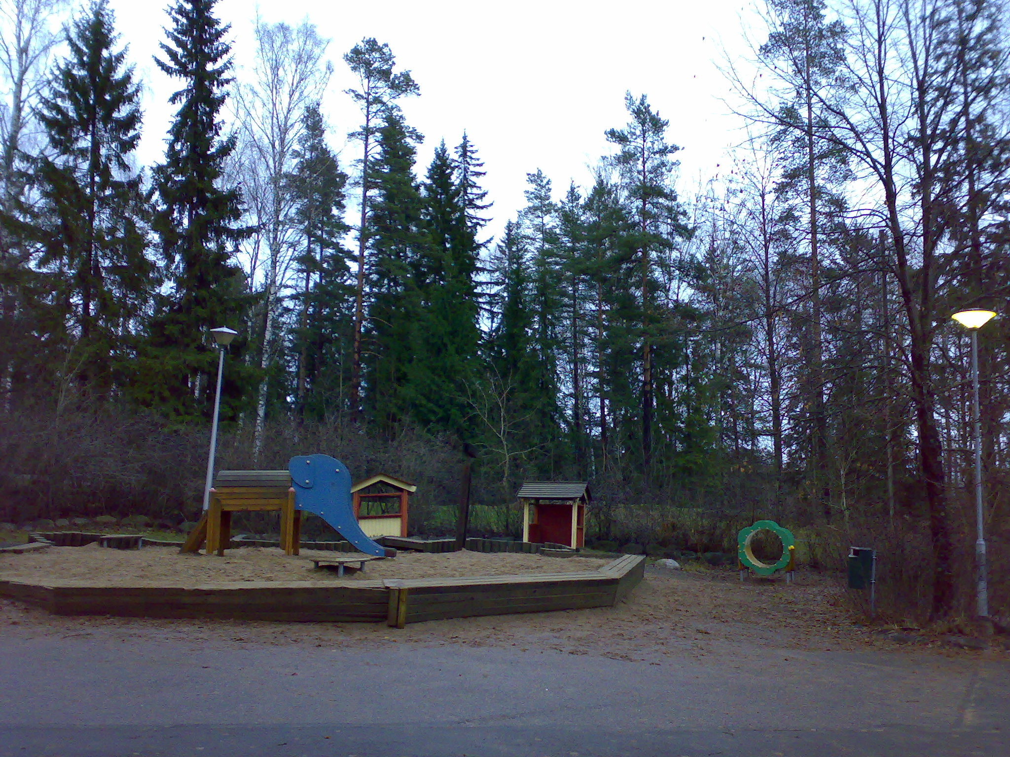 Korson asukaspuisto Vantaalla